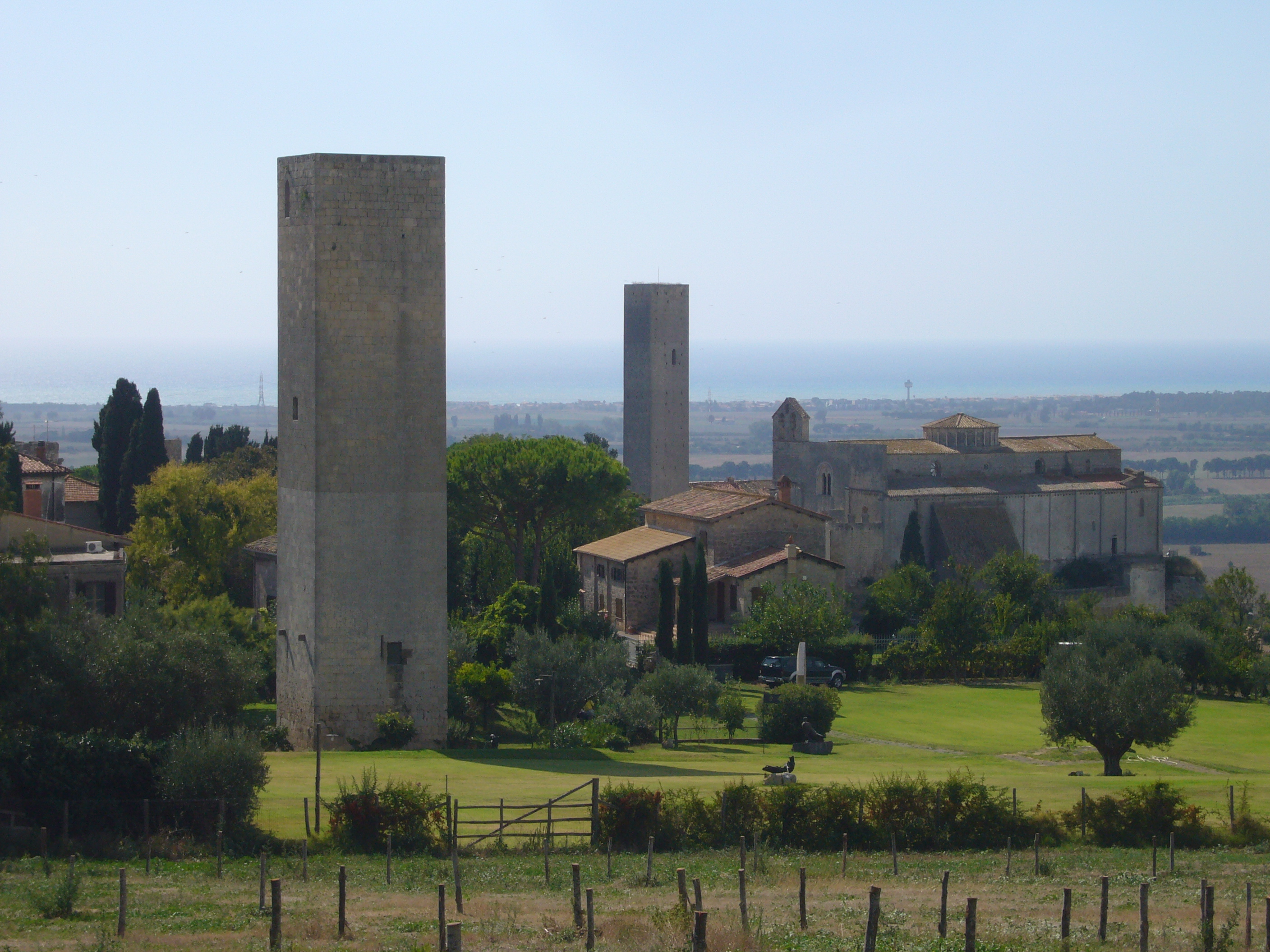 Tarquinia, Chiesa di Santa Maria in Castello e torri